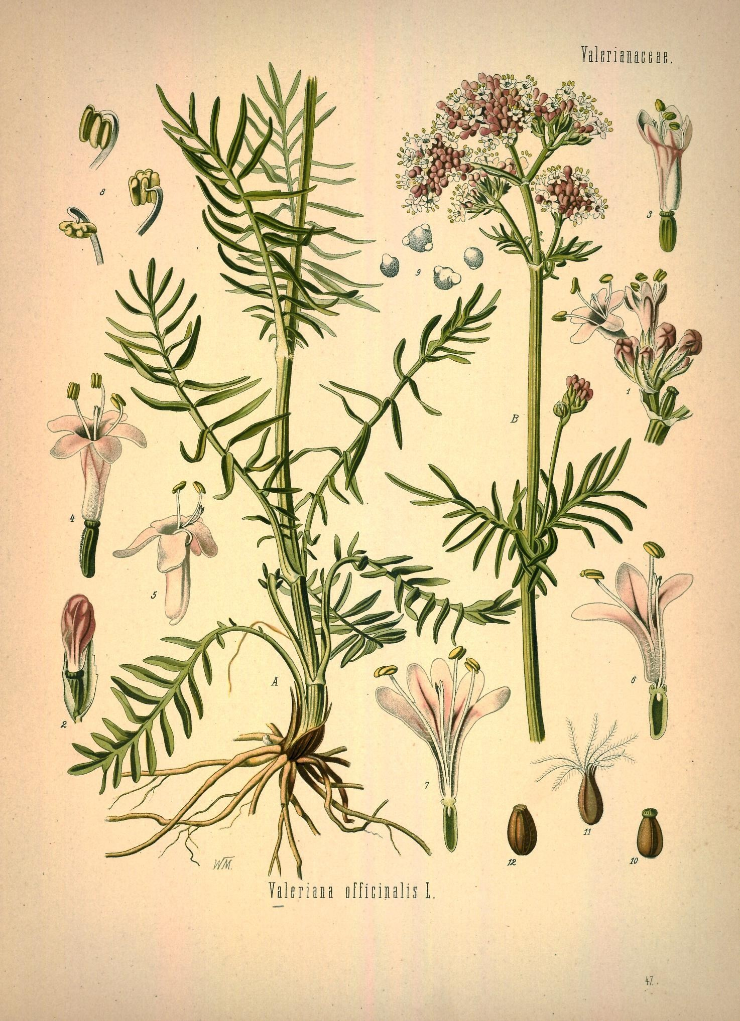 Baldrian. A B Pflanze der schmalblätterigen Form in natürl. Grösse; 1 Blüthenästchen, vergrössert; 2 Blüthenknospe mit Deckblättchen, desgl.; 3, 4, 5 Blüthen, desgl.; 6 u. 7 dieselben im Längsschnitt, von verschiedenen Seiten, desgl.; 8 Staubgefässe, desgl.; 9 Pollen unter Wasser, desgl.; 10 junge Frucht ohne Federkrone, desgl.; 11 dieselbe mit Federkrone, desgl.; 12 Same, desgl.